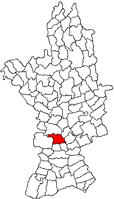 Categorie:Hărţi ale judeţului Olt